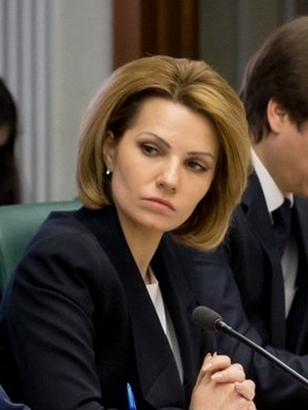 Волкова Наталья Марковна — художественный руководитель Донецкого государственного академического музыкально-драматического театра